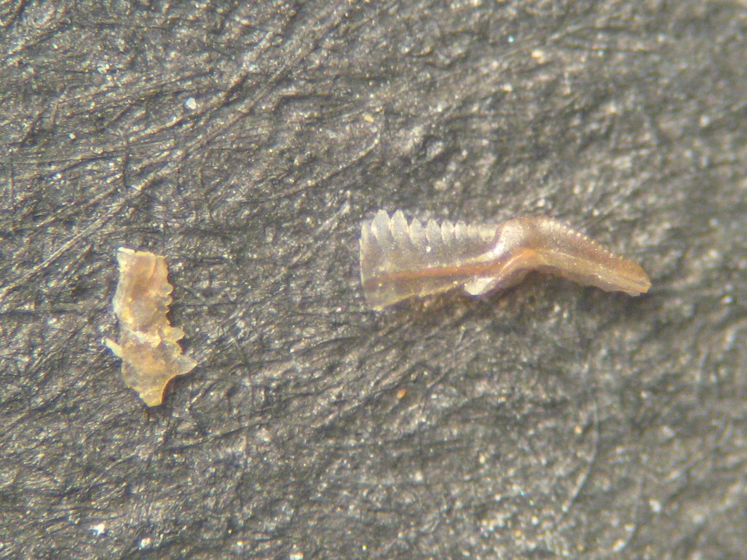 Conodontes vistos com lupa binocular (5x a 10x)